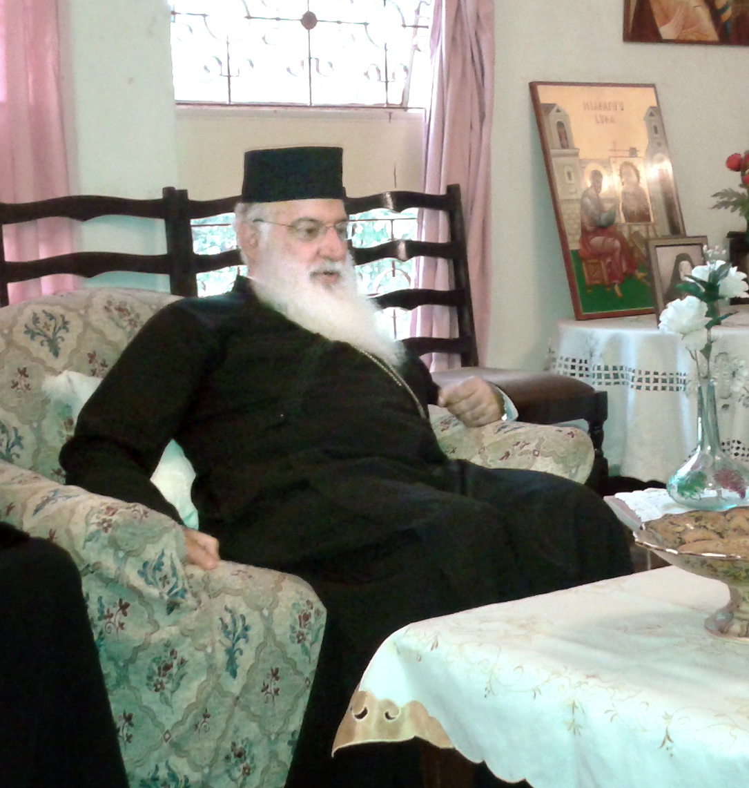 Ο Υφυπουργός Εξωτερικών Α. Γεροντόπουλος επισκέφθηκε την Παρασκευή 20 Ιουνίου την Ορθόδοξη Πατριαρχική Σχολή «Αρχιεπίσκοπος Μακάριος Γ”» και συναντήθηκε με τον Σεβασμιώτατο Μητροπολίτη Κένυας, κ. Μακάριο